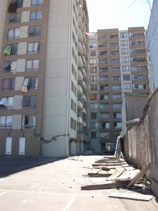 Edificio Plaza del Río colapsado en terremoto de Chile 27 de febrero de 2010. VIII Región